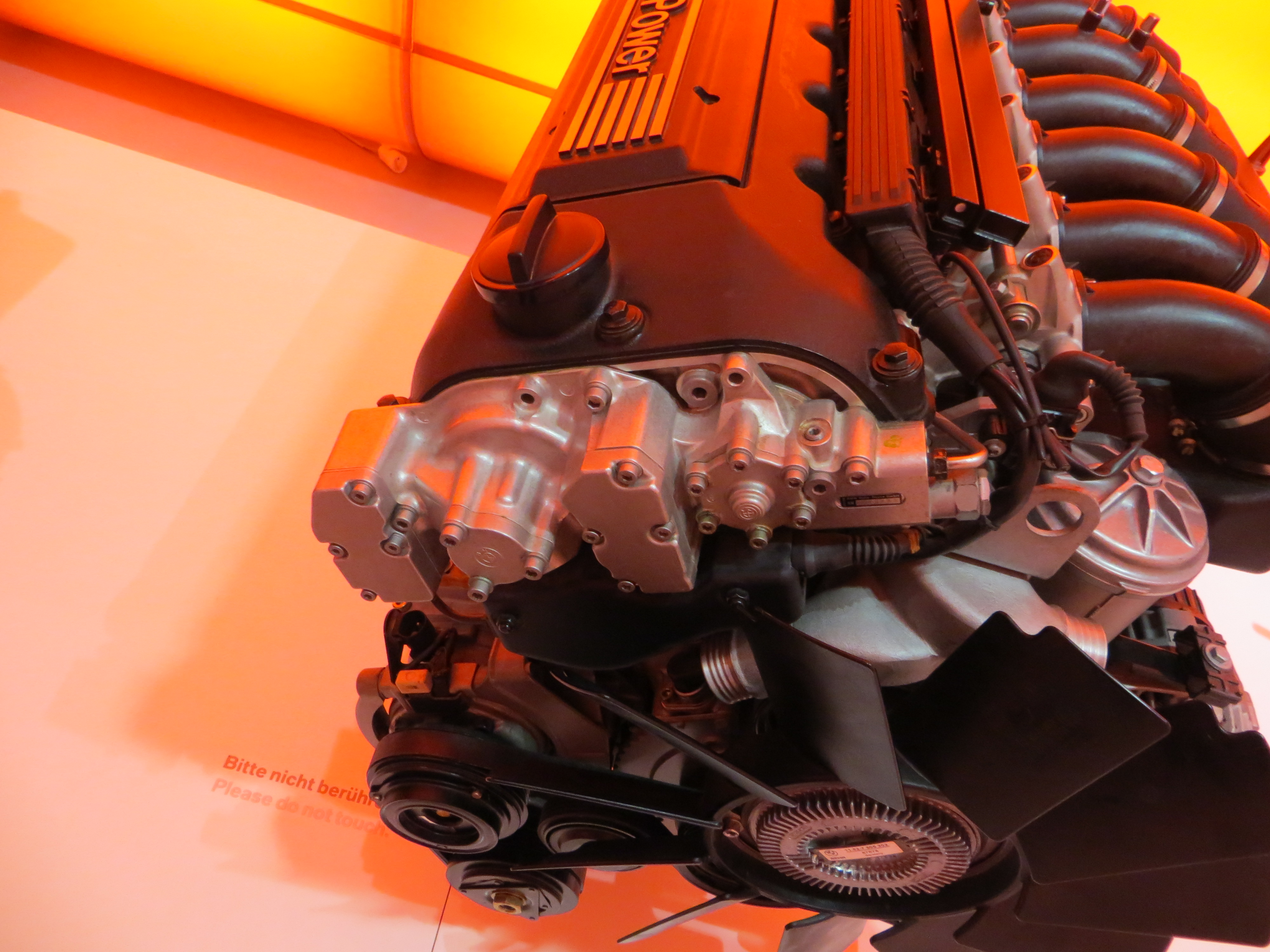 BMW S50B32 vollvariables Hochdruck-Vanos